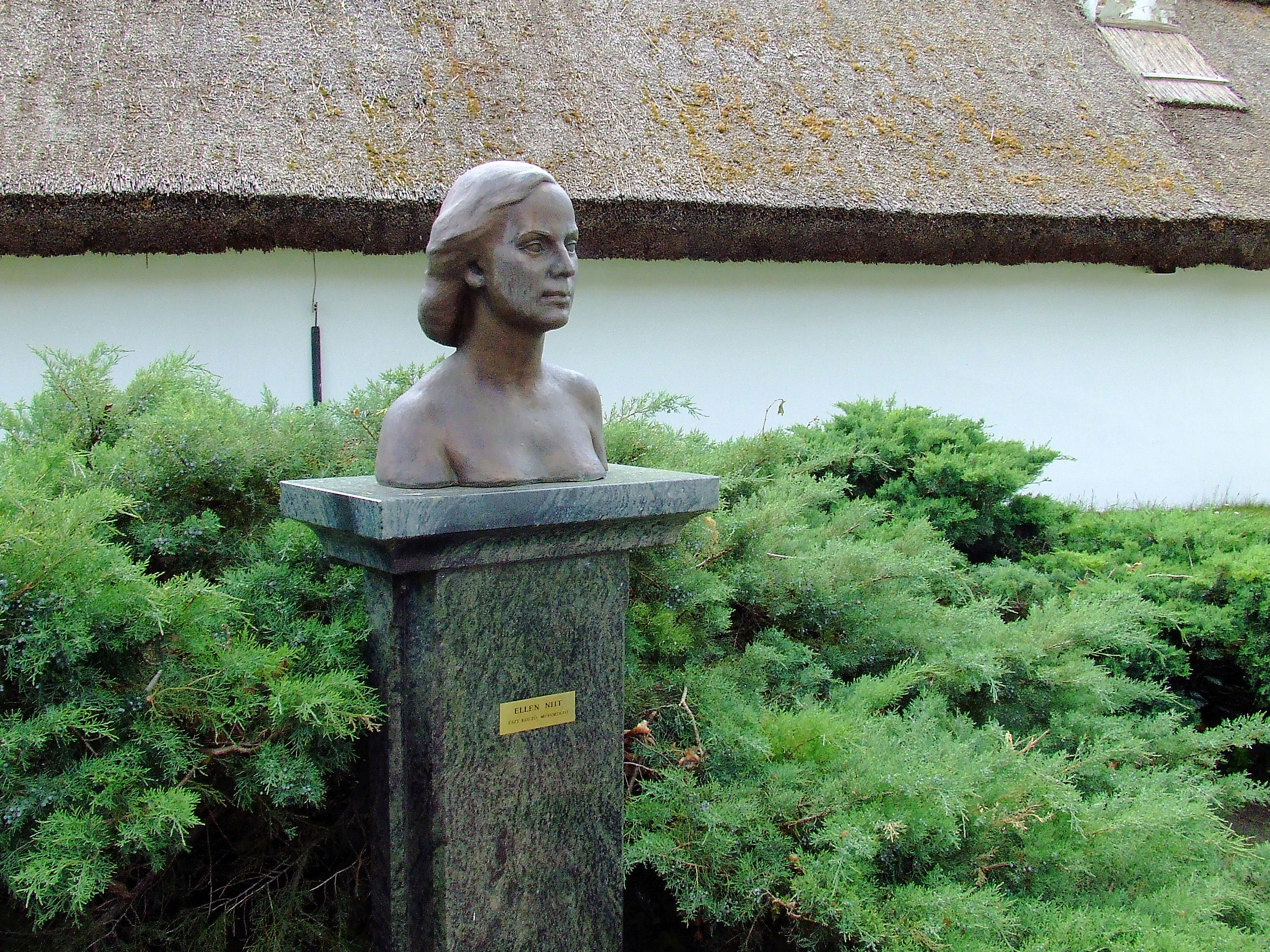 Ellen Niit (*1928) észt író szobra Kiskőrösön Petőfi fordítóinak szoborparkjában. Erna Viitol (1920–2001) észt szobrászművész alkotása (1954; felállítás éve:2009)